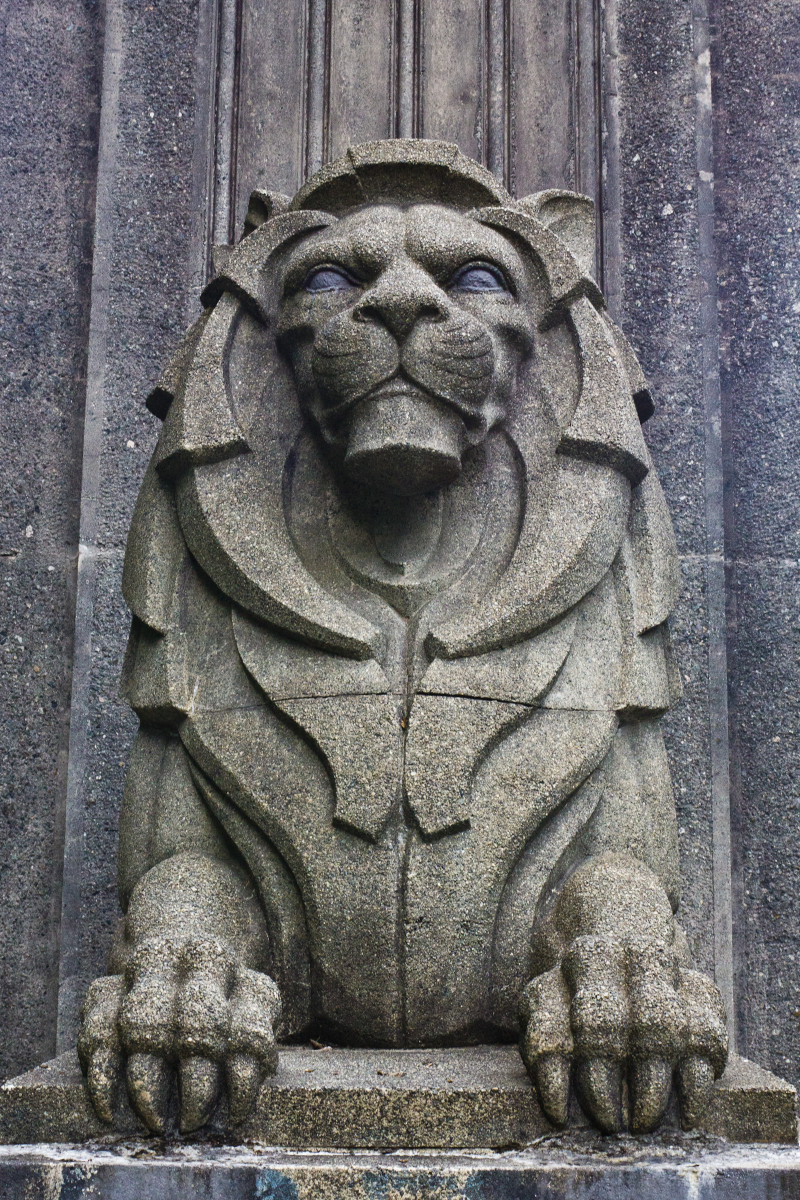 Lions Gate